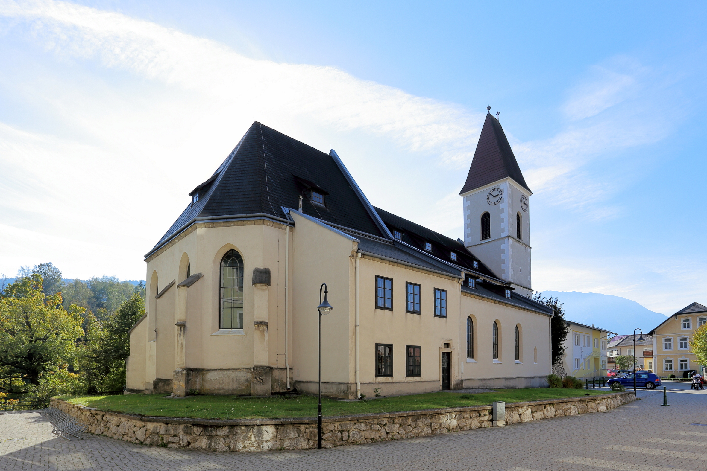 Nordostansicht der römisch-katholischen Pfarrkirche hl. Vitus in der niederösterreichischen Marktgemeinde Puchberg am Schneeberg.